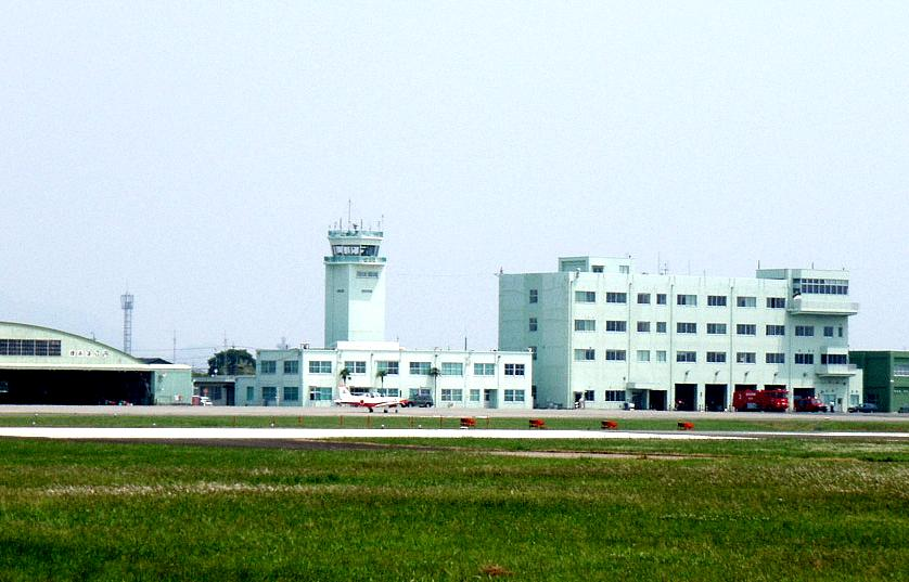 JASDF Shizuhama Air Base, Yaizu, Shizuoka, Japan